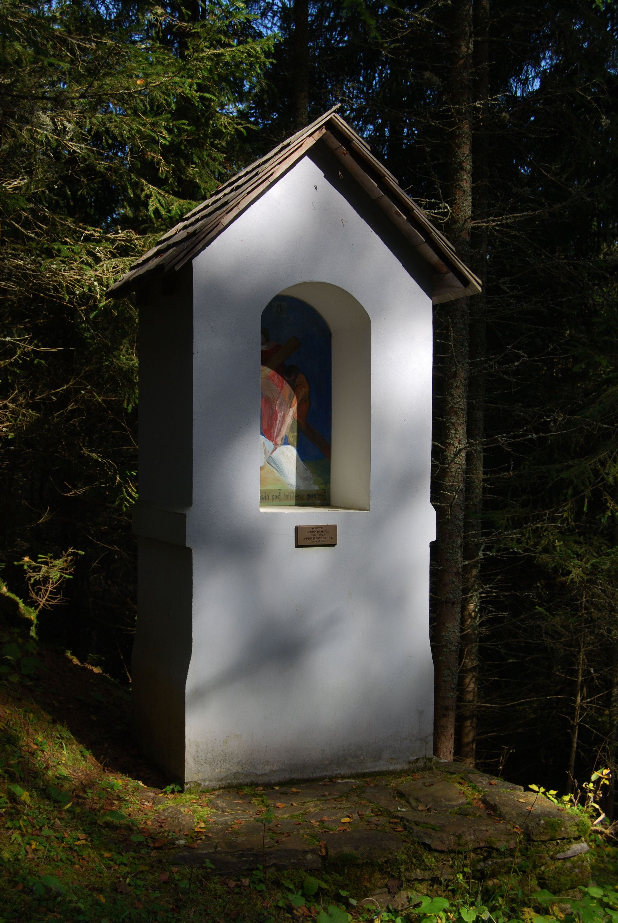 Jednotlivá zastavení křížové cesty. Borová Lada. Okres Prachatice. Česká republika.